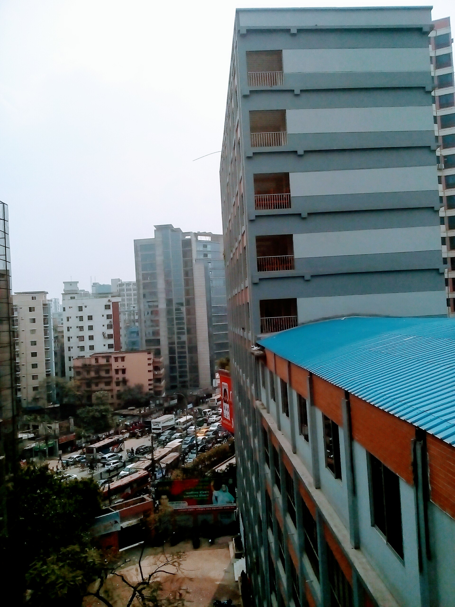 হাবীবুল্লাহ বাহার কলেজের ১২ তলা ভবন।